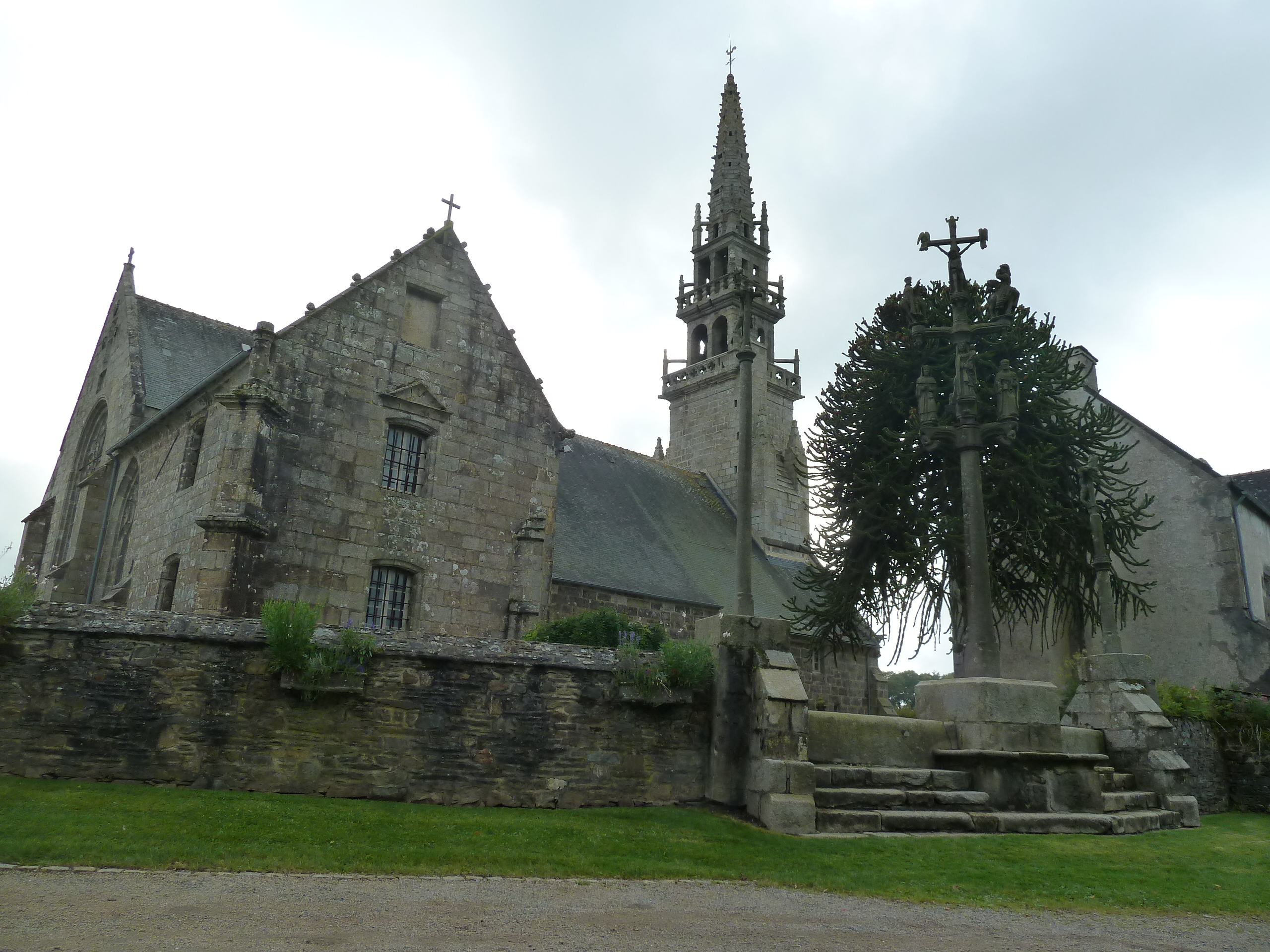 Eglise et son enclos, Pencran